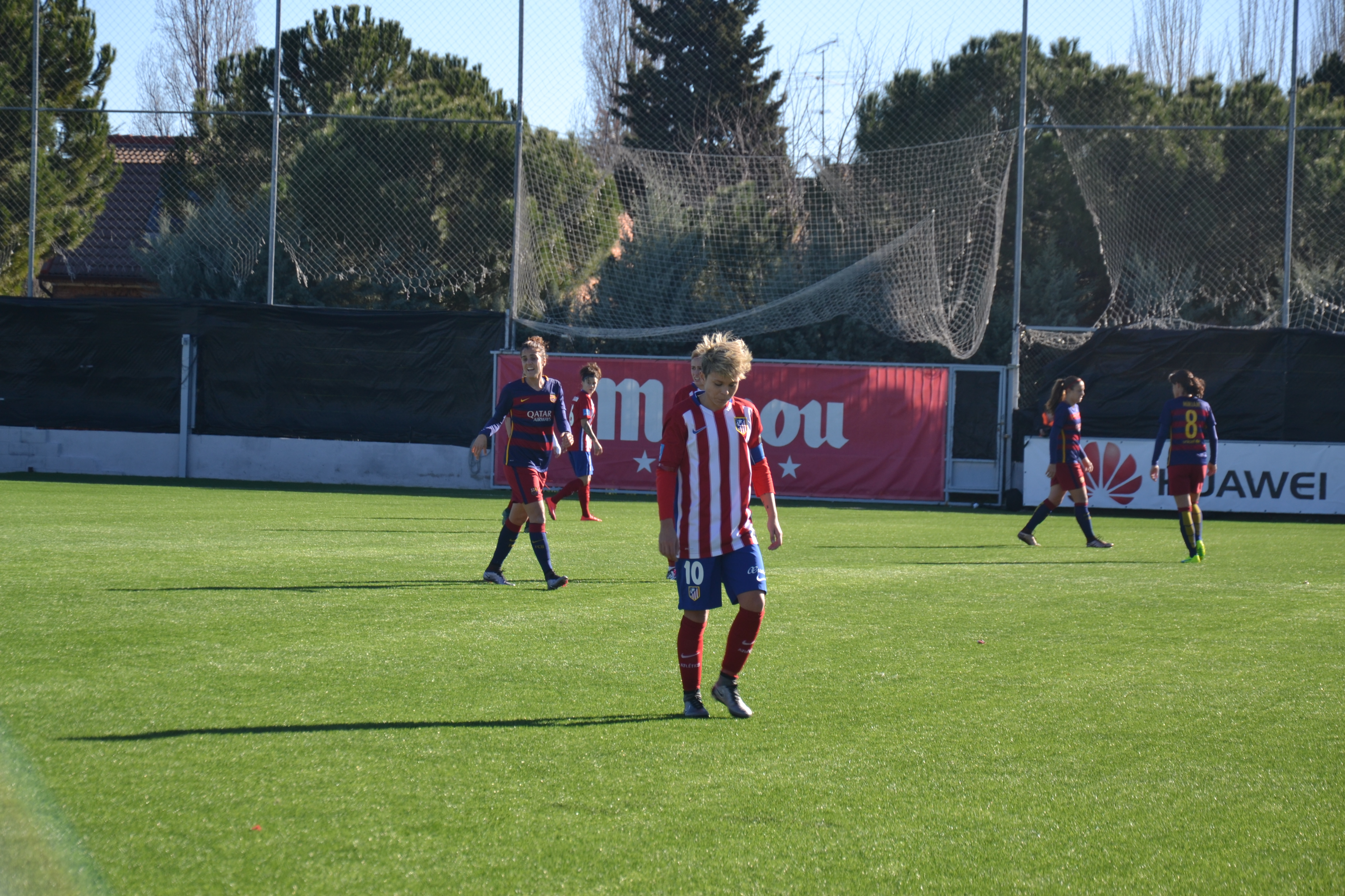 Partido contra el Barcelona el 16-01-2016